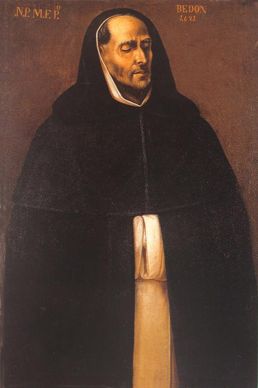 Retrato de Fray Pedro Bedon (1551-1621) a la hora de su muerte